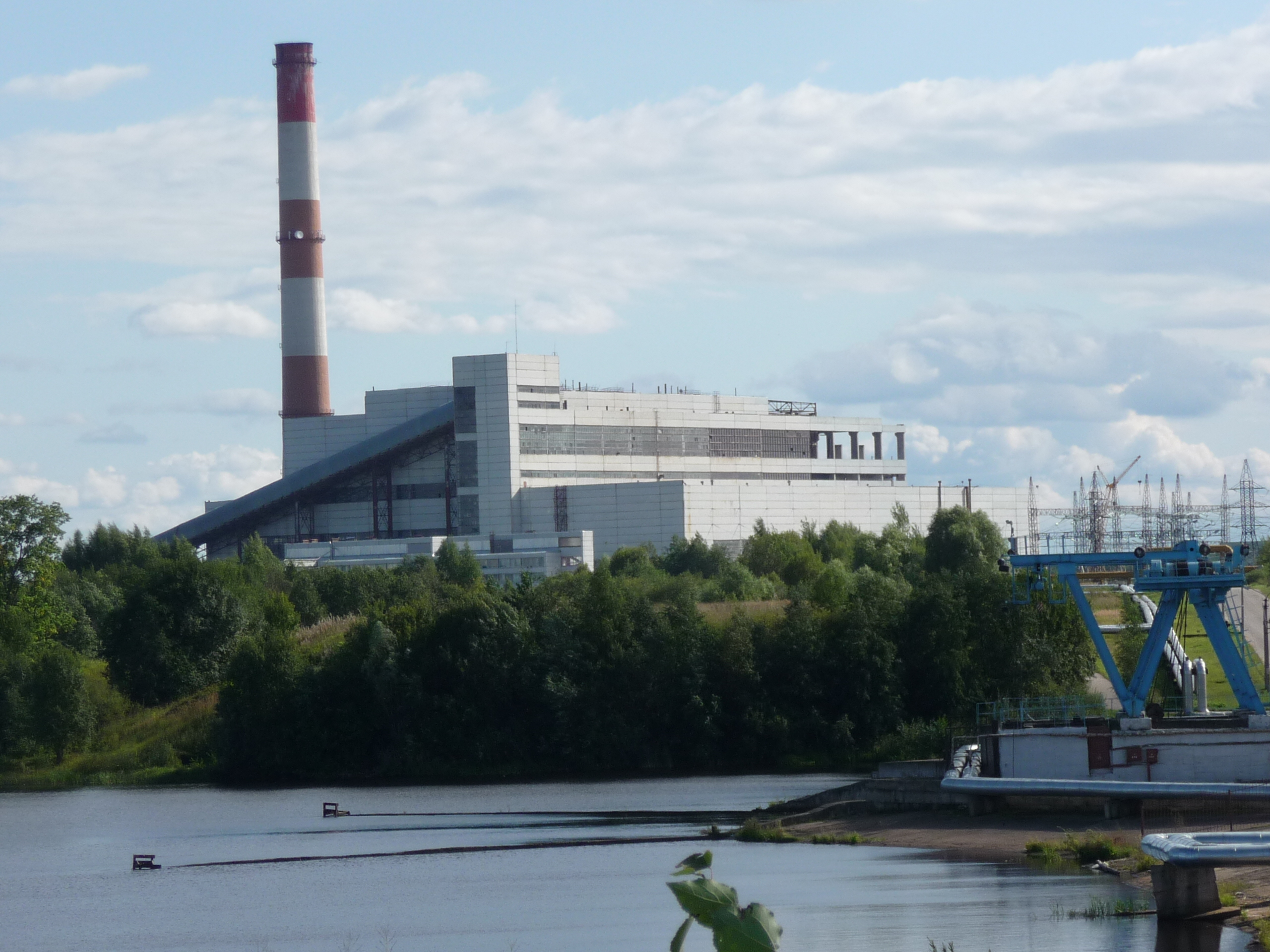 Здание Псковской ГРЭС